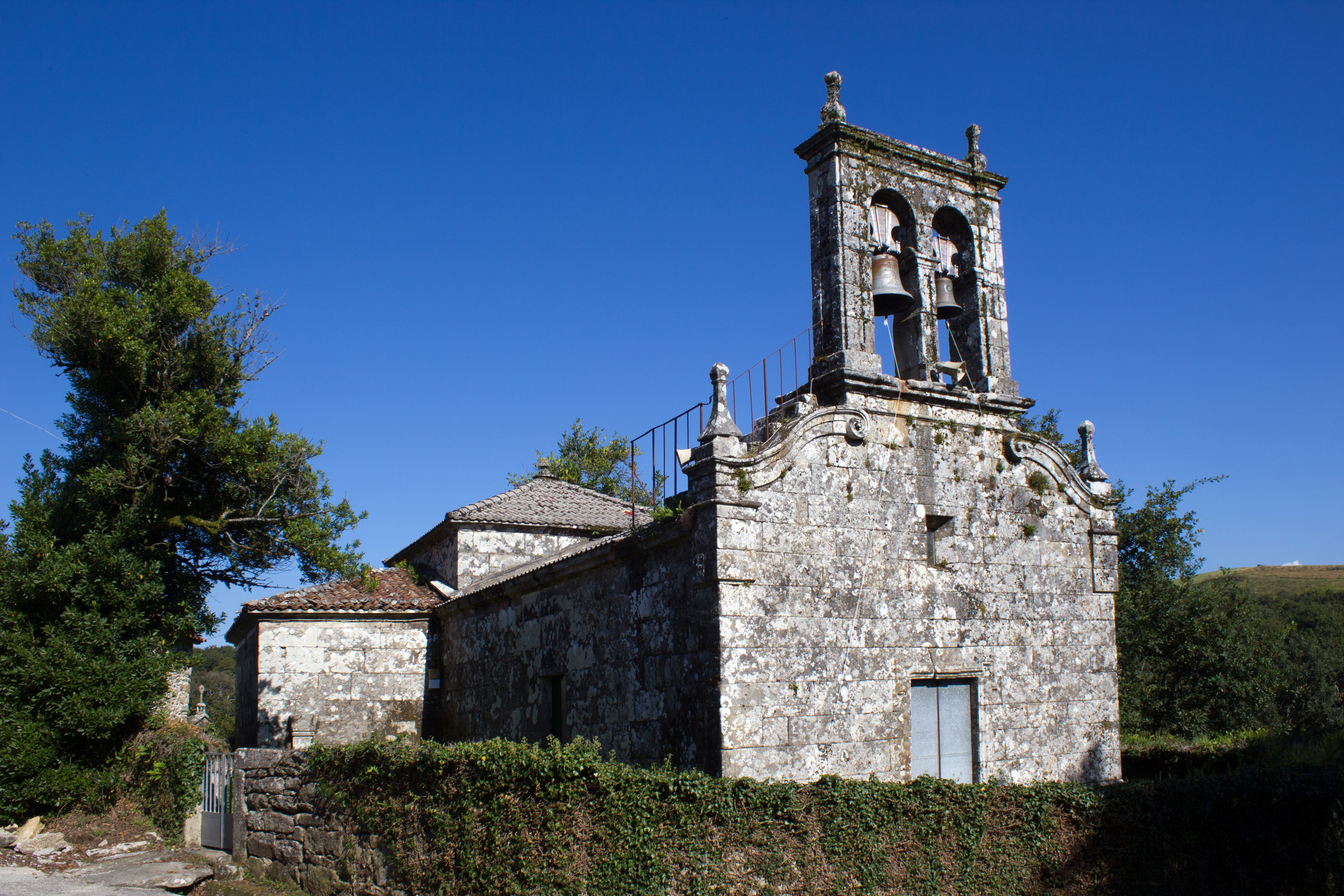 Igrexa de San Bartolomeu de Pereira, no concello de Forcarei.